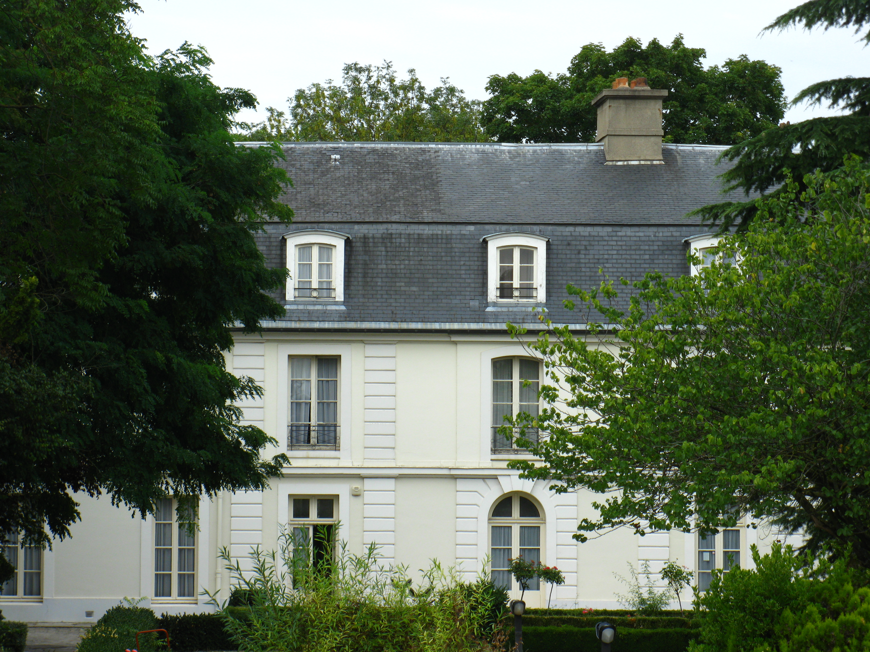 Photographie du château du Rancy à Bonneuil-sur-Marne (94) depuis la rue Paul-Vaillant-Couturier .